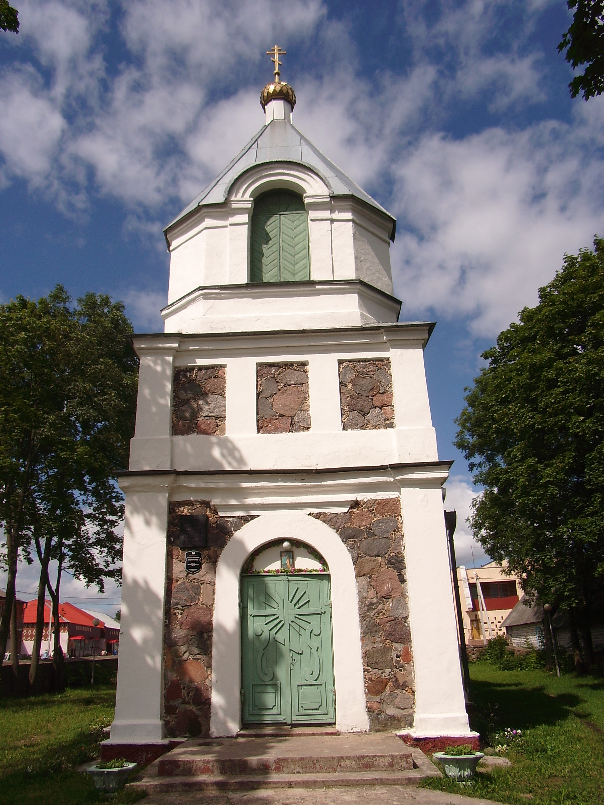 Беларуская (тарашкевіца): Ільлінская царква. в. Нарач This is a photo of Belarusian heritage monument. Reference number: 613Г000444 ( WLM)